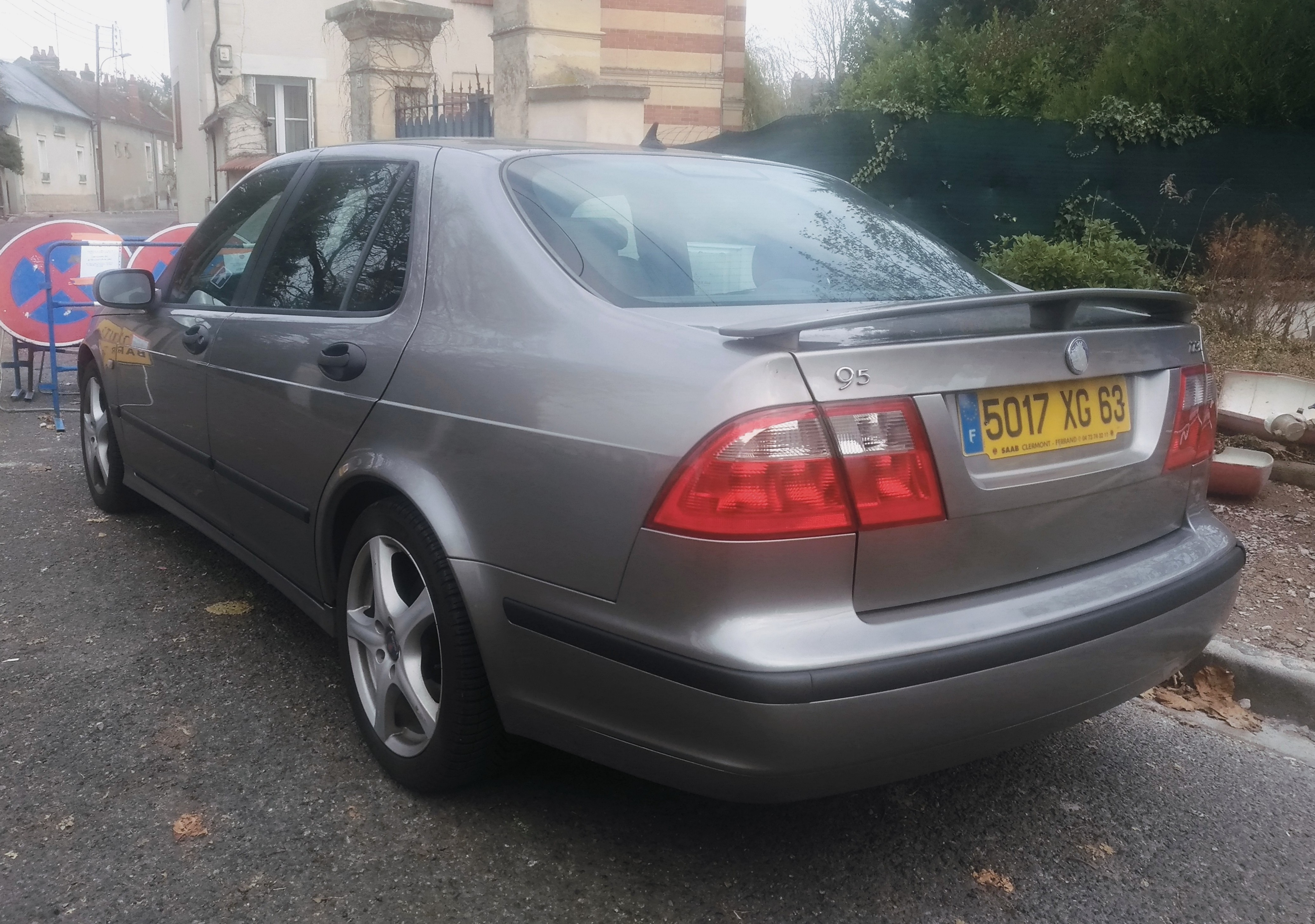 Saab 9.5